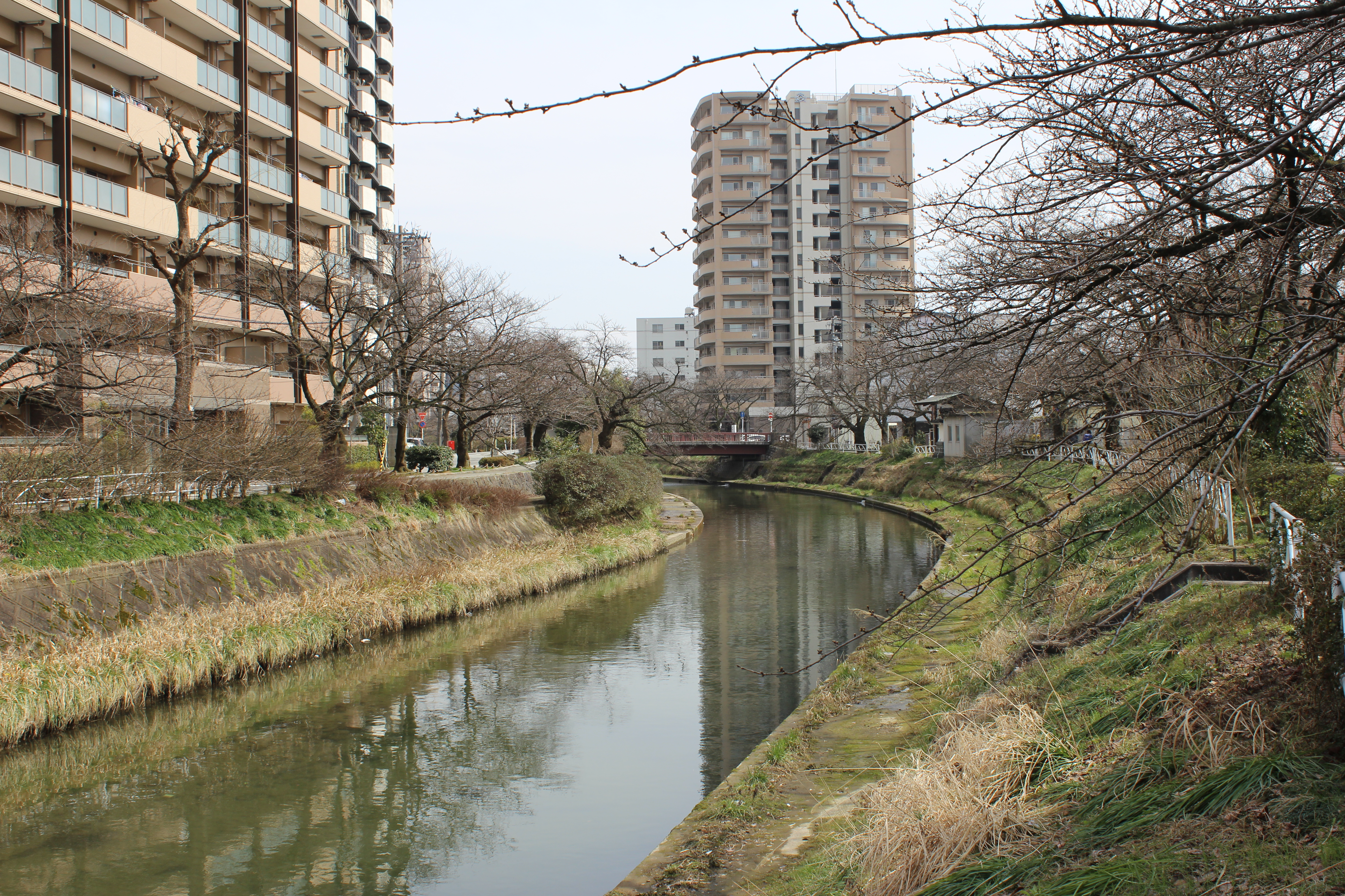 いたち川 今木橋（いまきはし）付近より上流方向